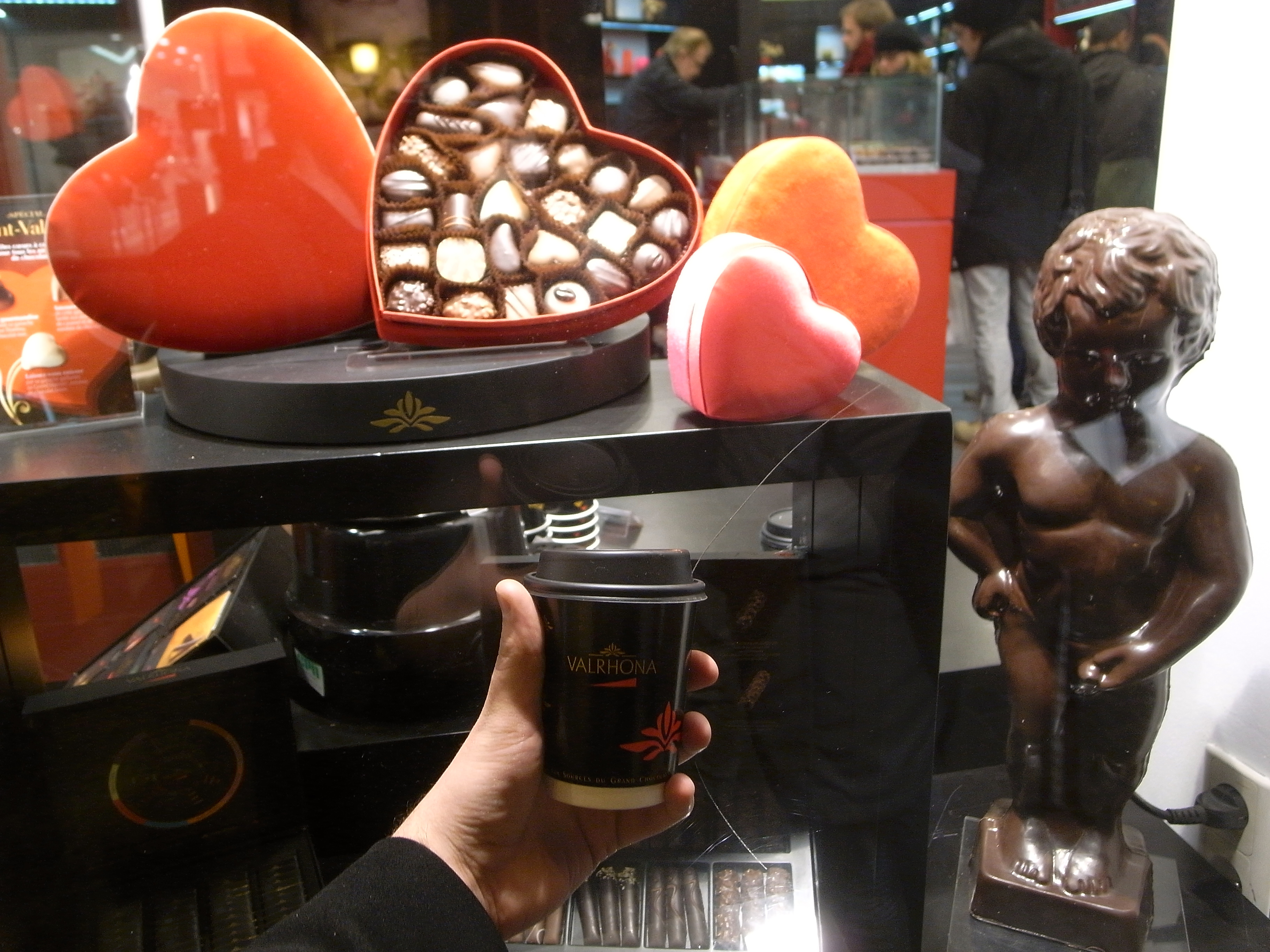 Assortiment Valrhona